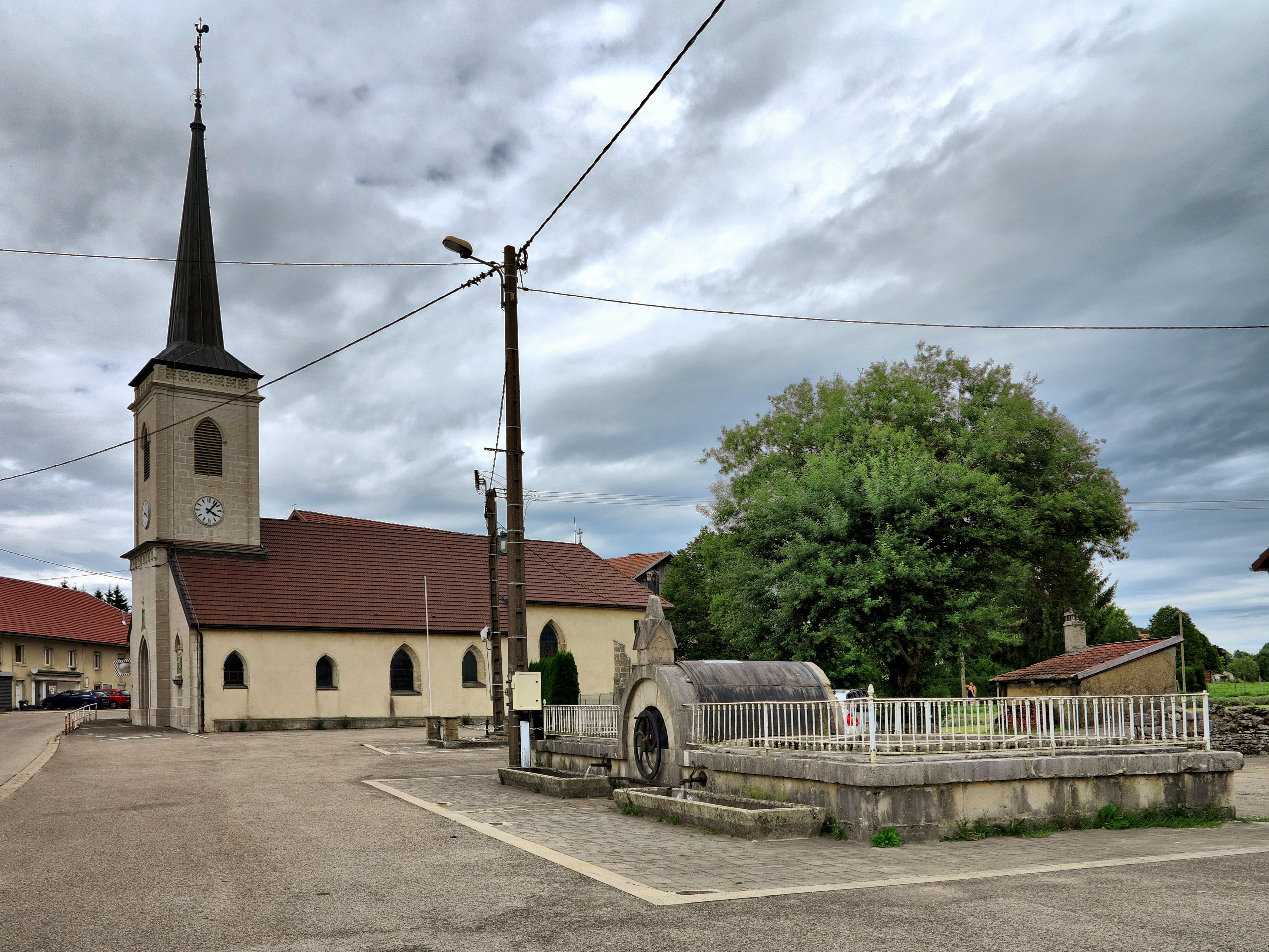 La fontaine et l'église